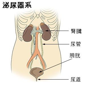 泌尿器